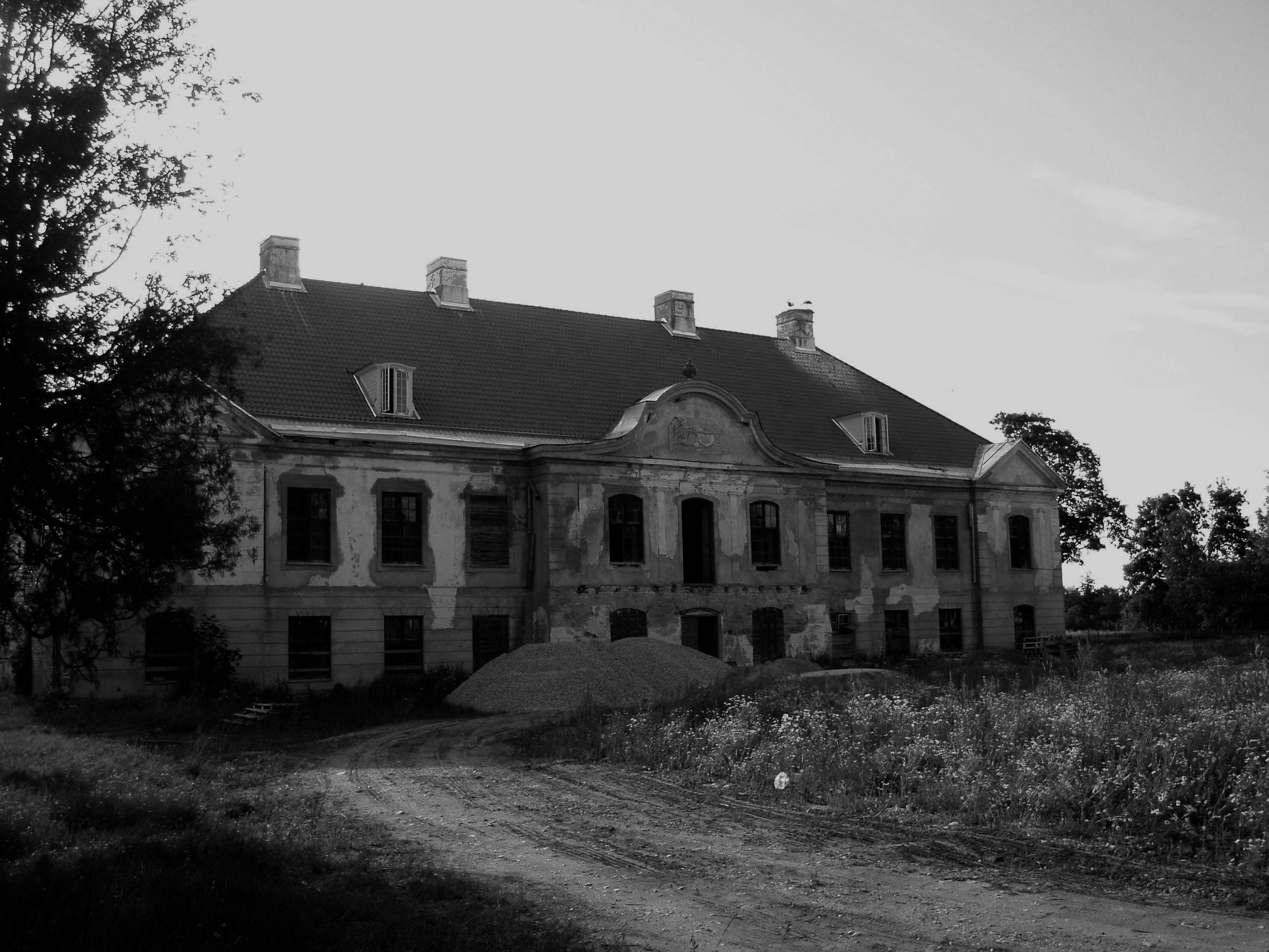 Päärdu mõisa peahoone 2006. aastal.